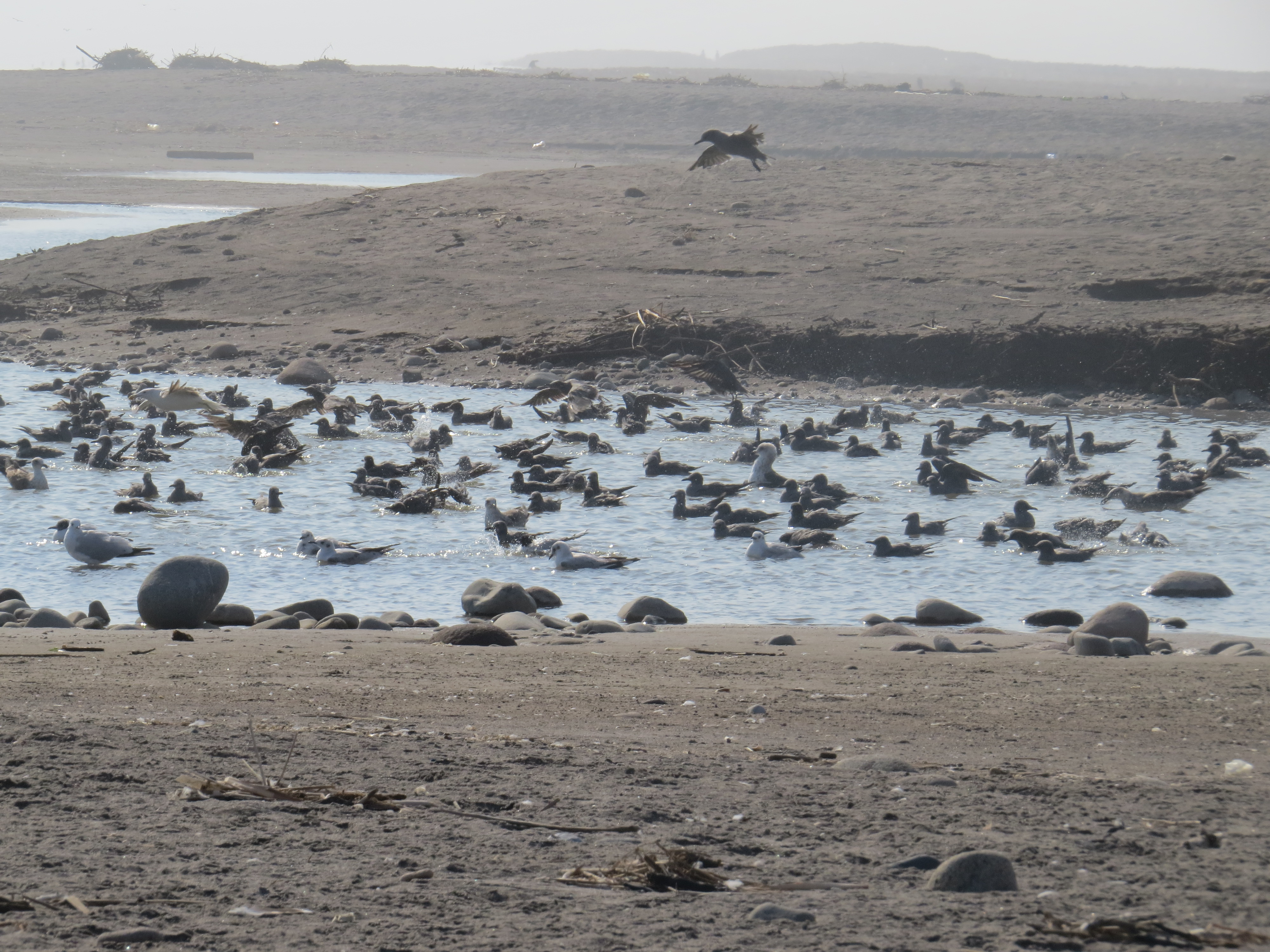 Desembocadura Rio Lluta